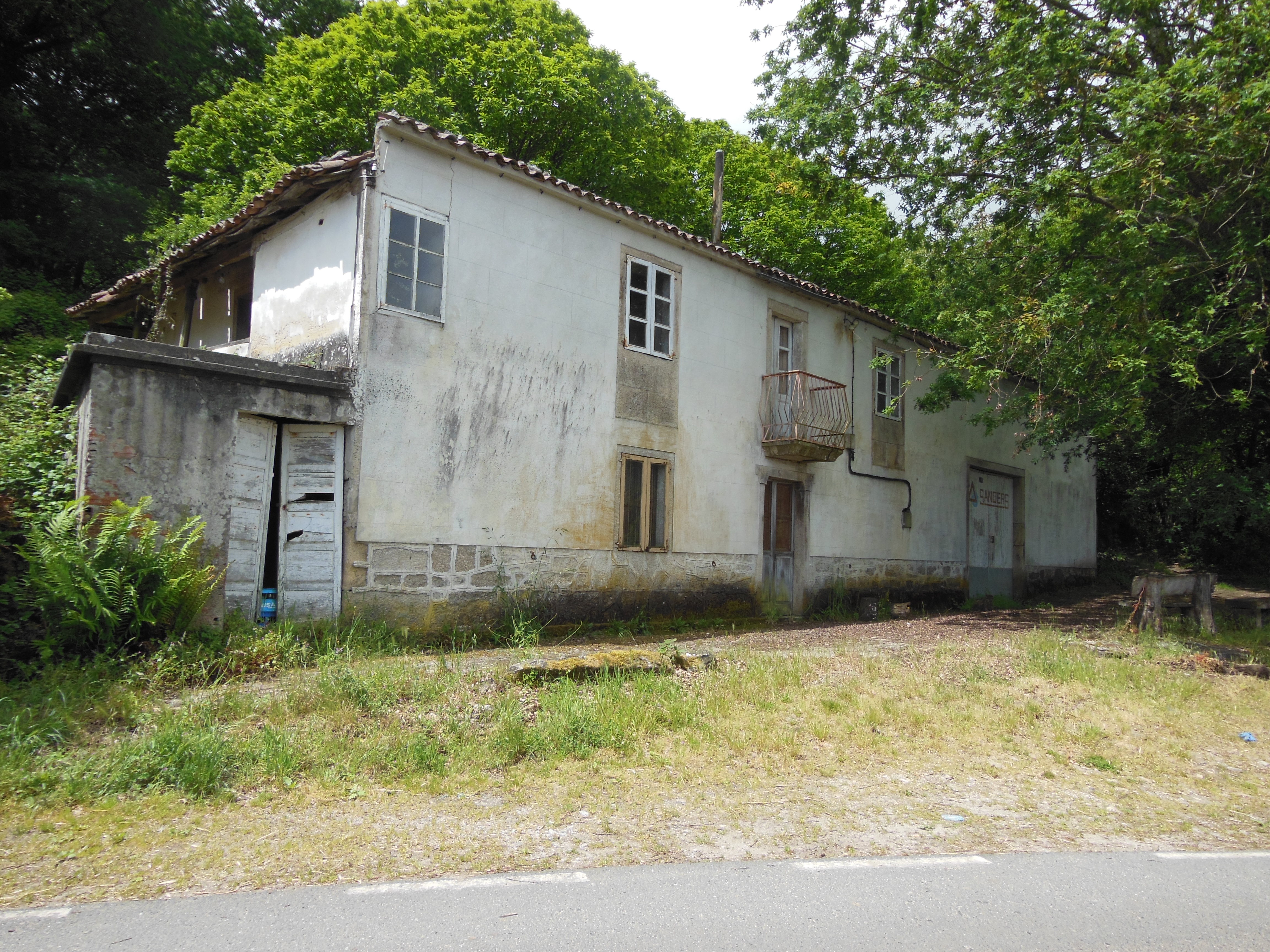 Construción en Puzos, Olveda, Antas de Ulla